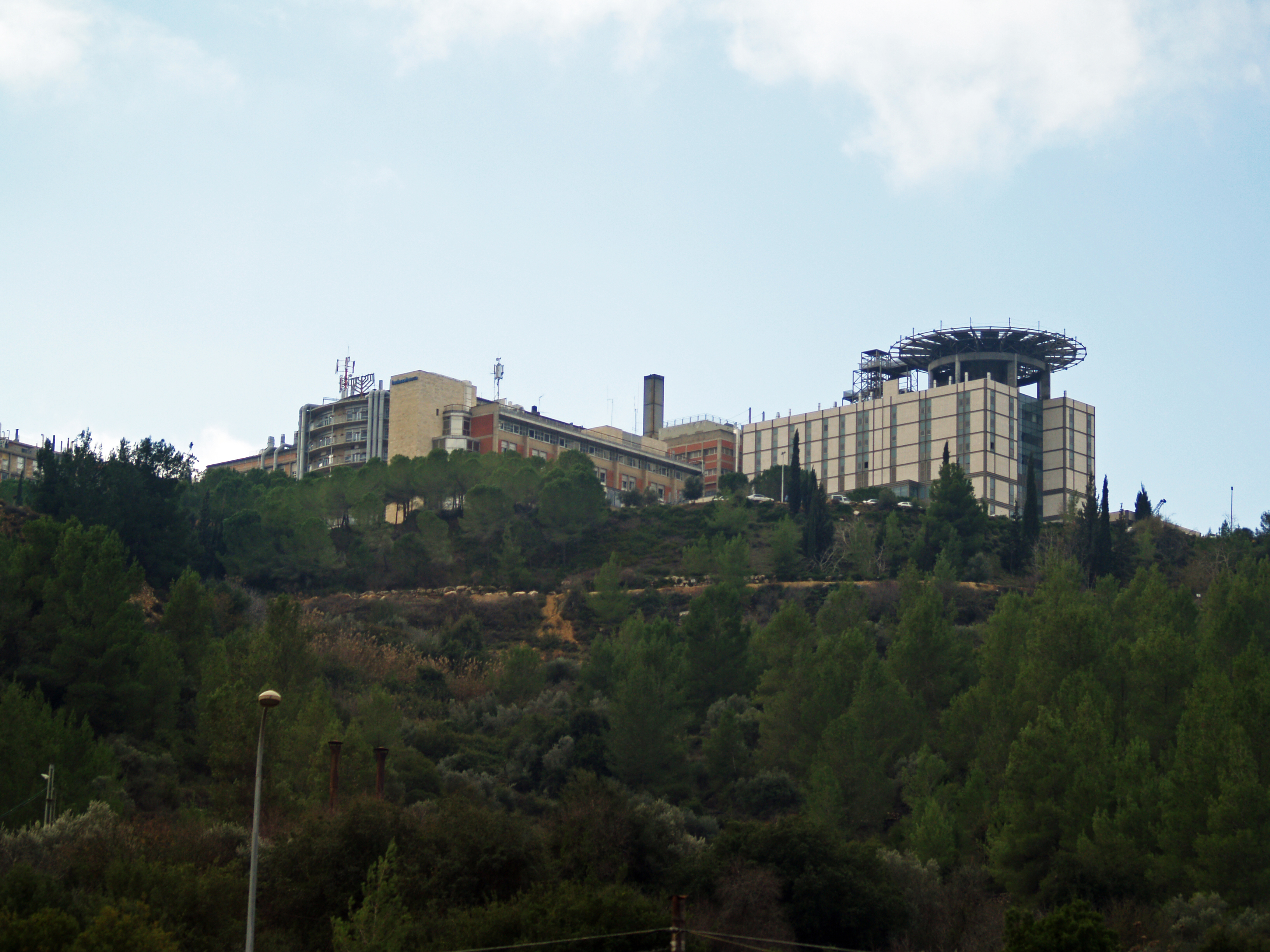 Hadassah Medical Center in Ein Kerem, Jerusalem, Israel